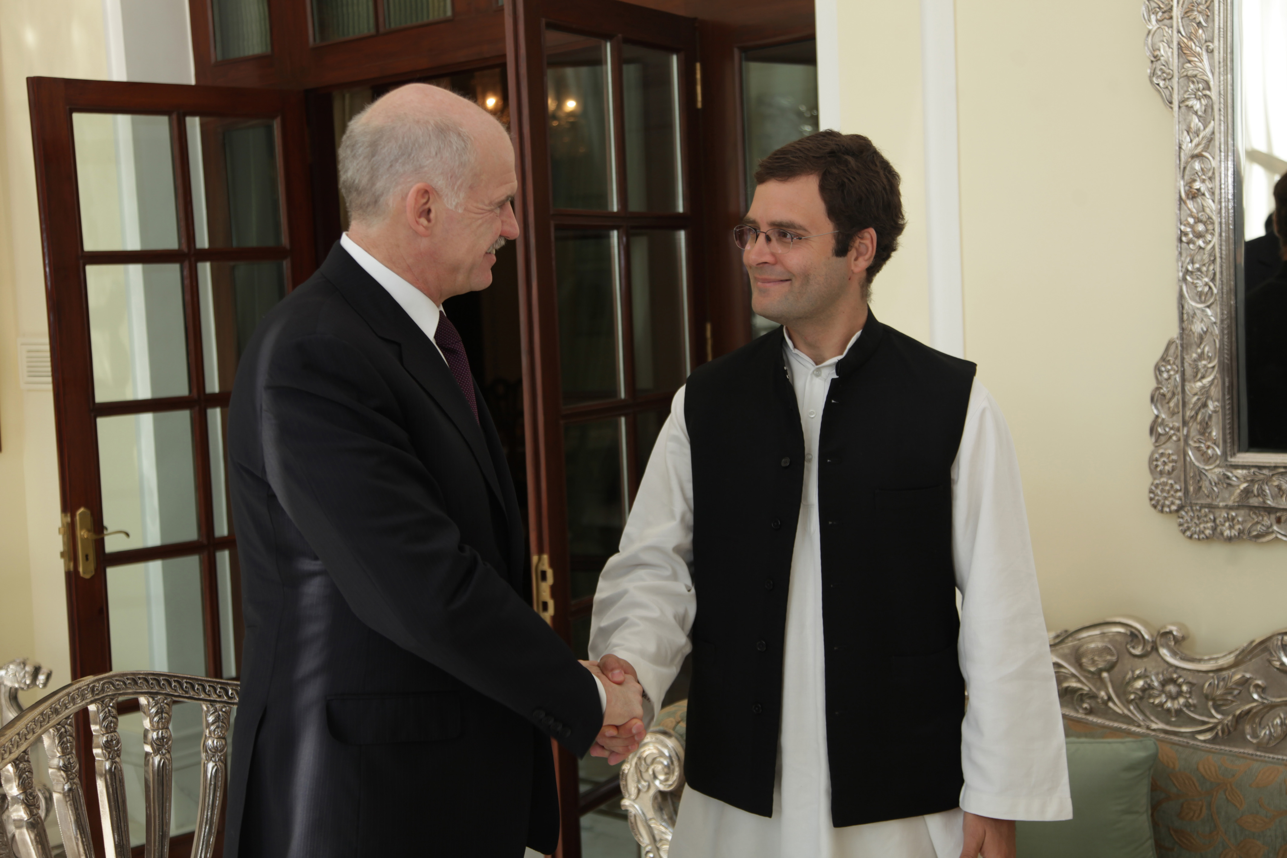 Image of Rahul Gandhi